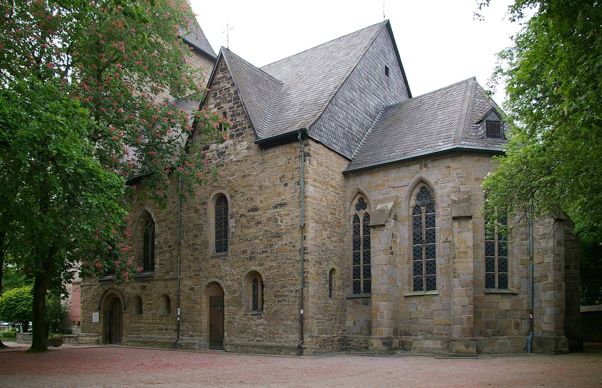 Evangelische Kirche in Dortmund-Brackel, Nordrhein-Westfalen. Apsis und Querschiff. Ursprung im 12. Jhdt., seit 1554 lutherisch.This is a photograph of an architectural monument. 0035